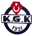 Kasımpaşa SK'nin eski logosu (1962-1996).